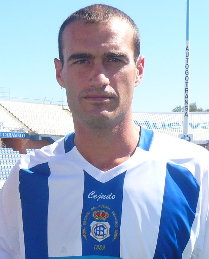 Presentación en el Colombino de Huelva, 2009